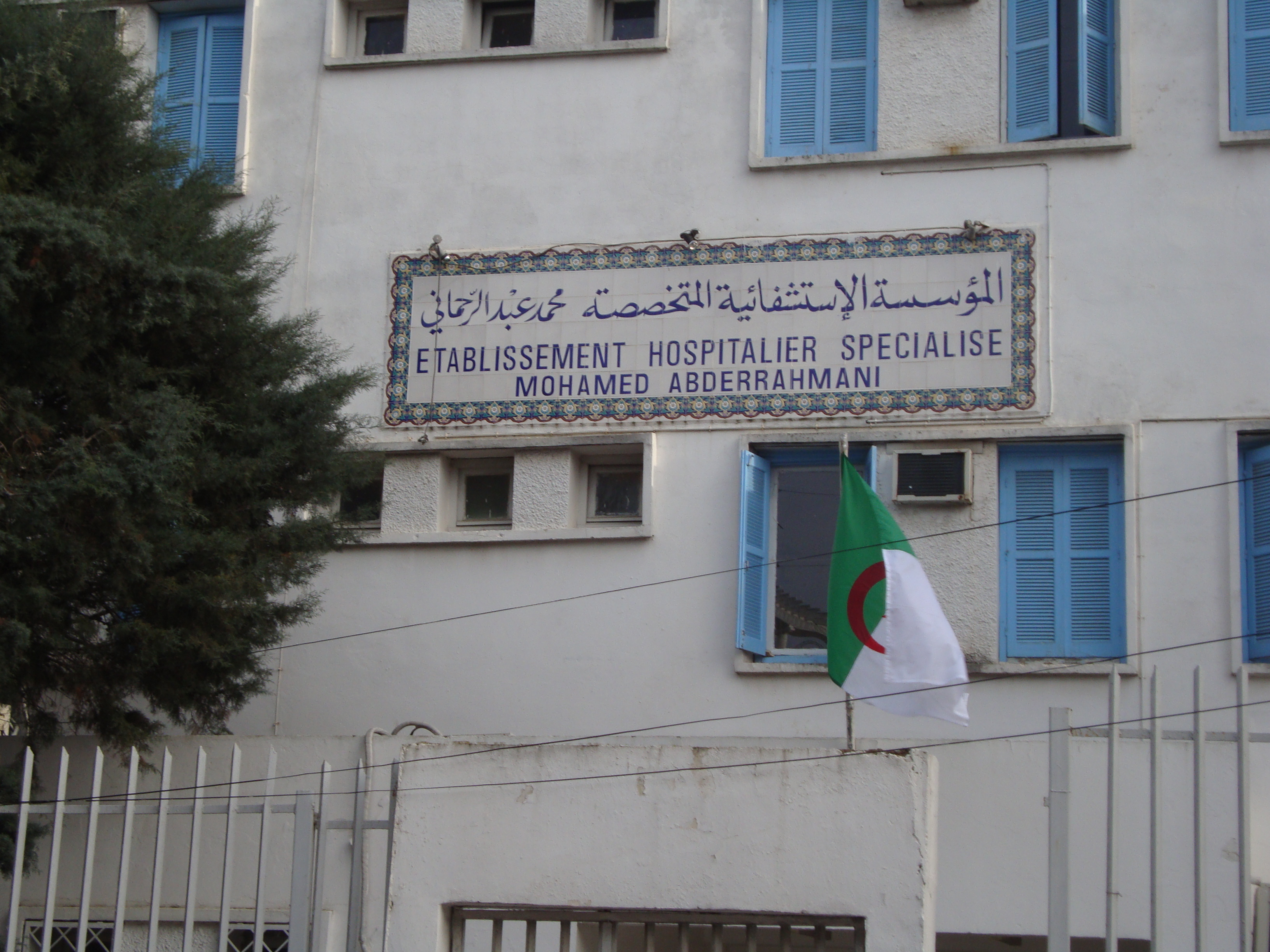 hôpital publique, spécialisé en chirurgie cardiovasculaire